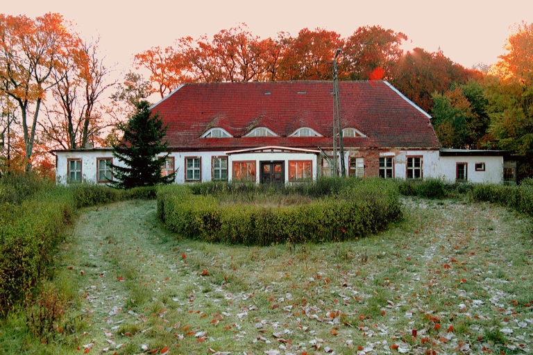 Skowarnki_Palac